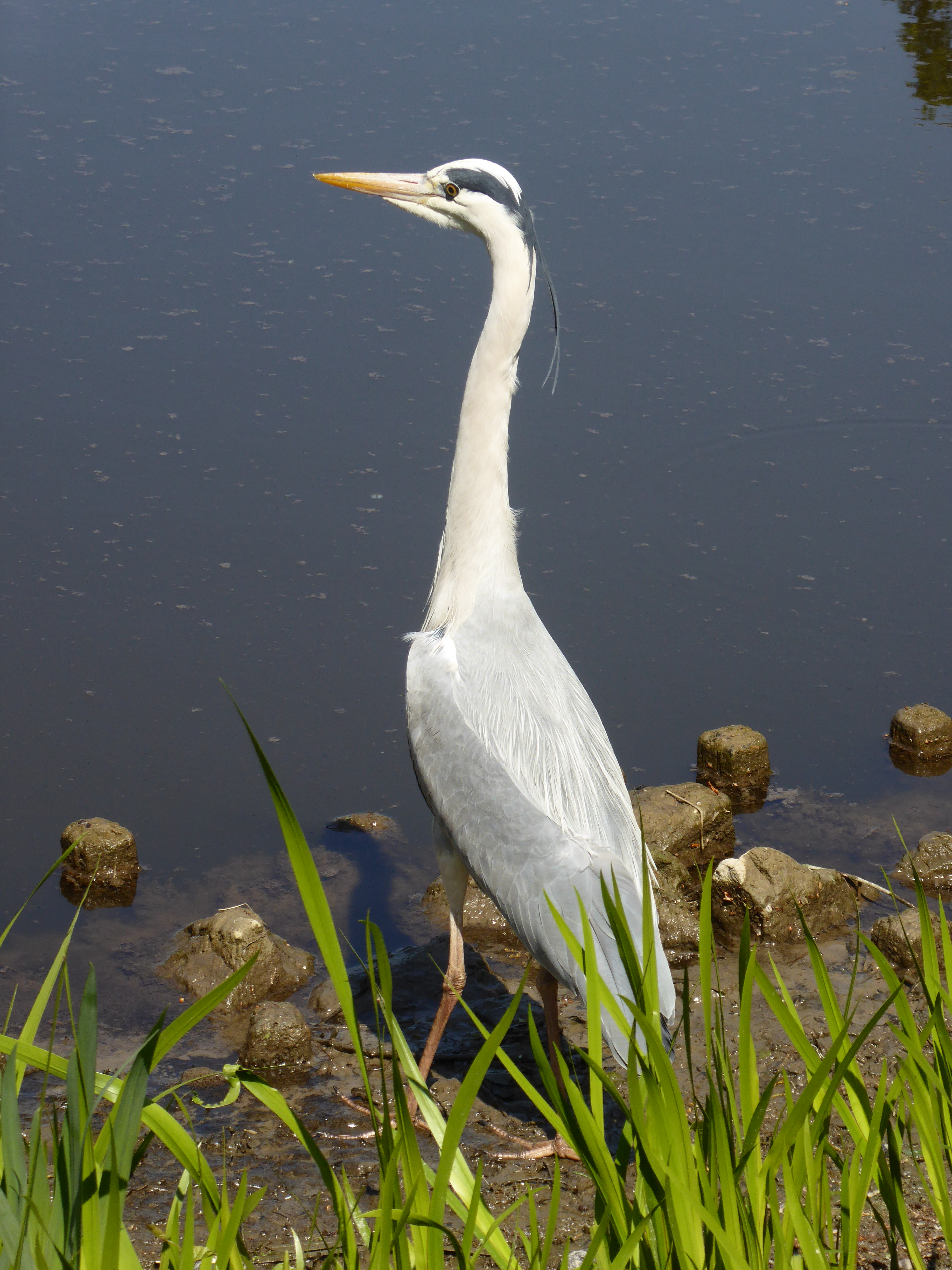 szürke gém (Schwetzingen, Németország)